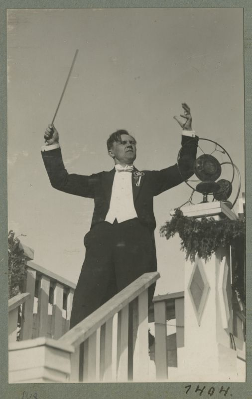 Laulupidu, dirigendipuldis Juhan Aavik